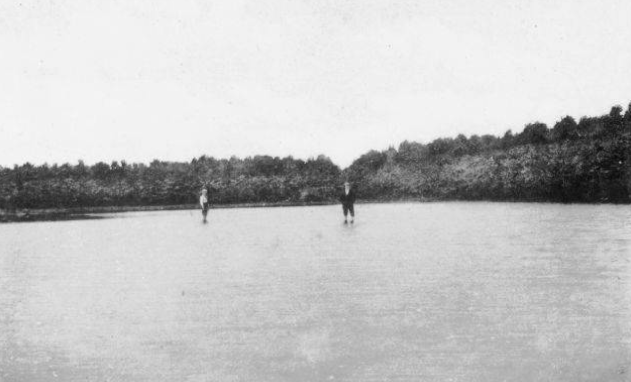 De Wite Mar (Witte Meer) in het Alpherbosch in Beetsterzwaag